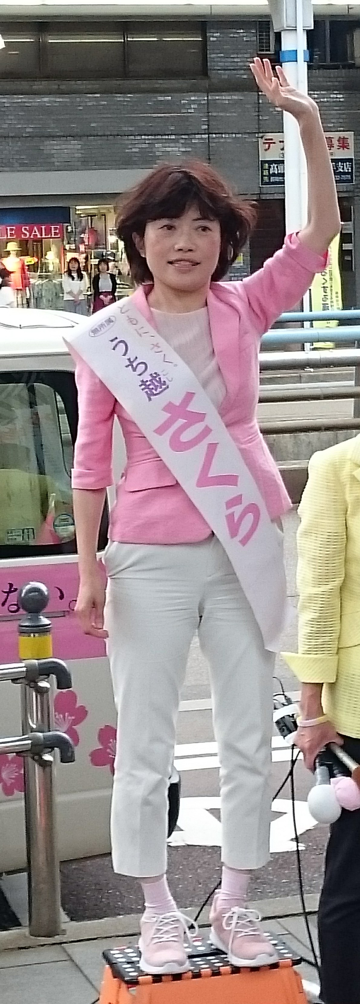 参議院議員の打越 さく良（新潟県長岡市にて）